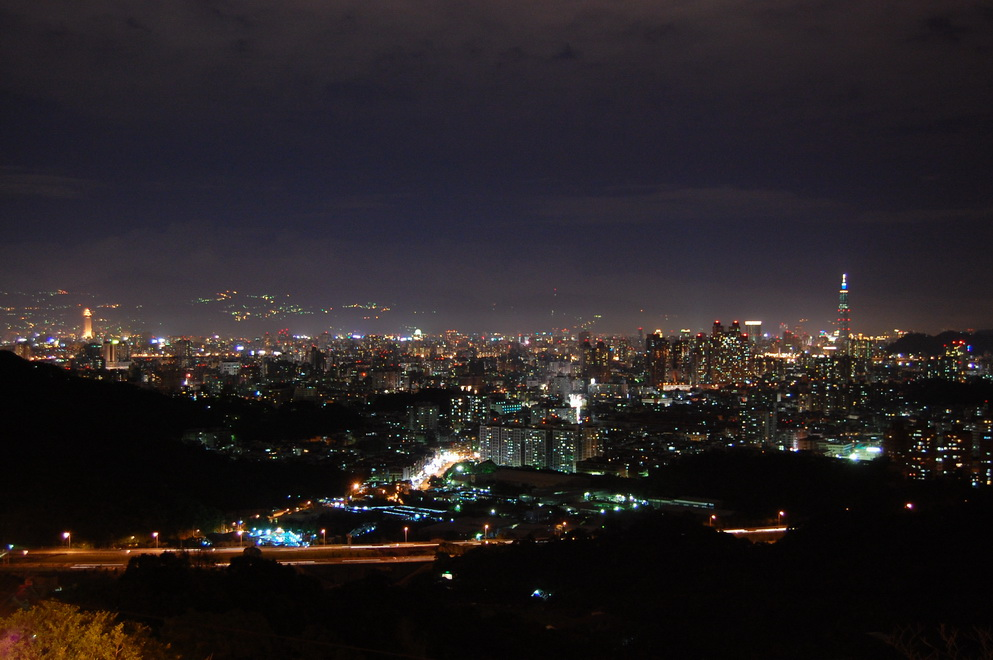 從臺北縣中和市（現新北市中和區）南山福德祠遠眺臺北101及新光摩天大樓。